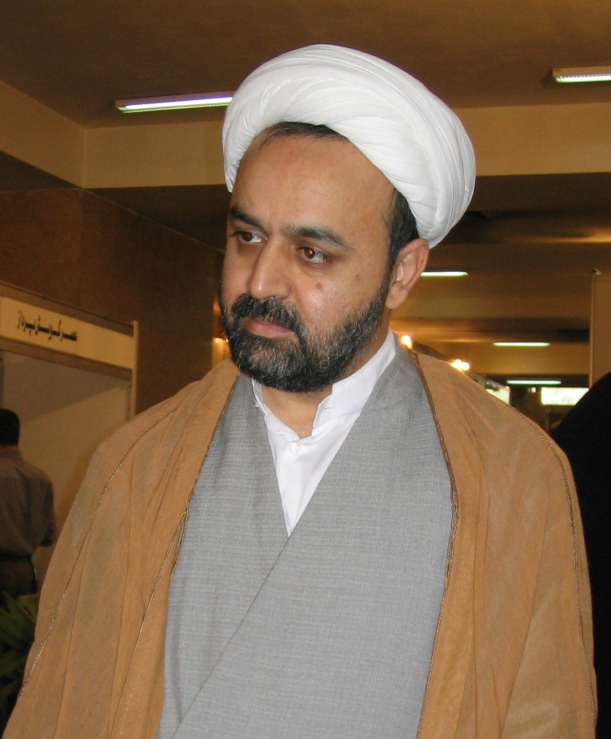 Hamid Shahriary, Second Workshop of Computer and Persian Language, Tehran University حمید شهریاری، دومین کارگاه پژوهشی زبان فارسی و رایانه، دانشگاه تهران